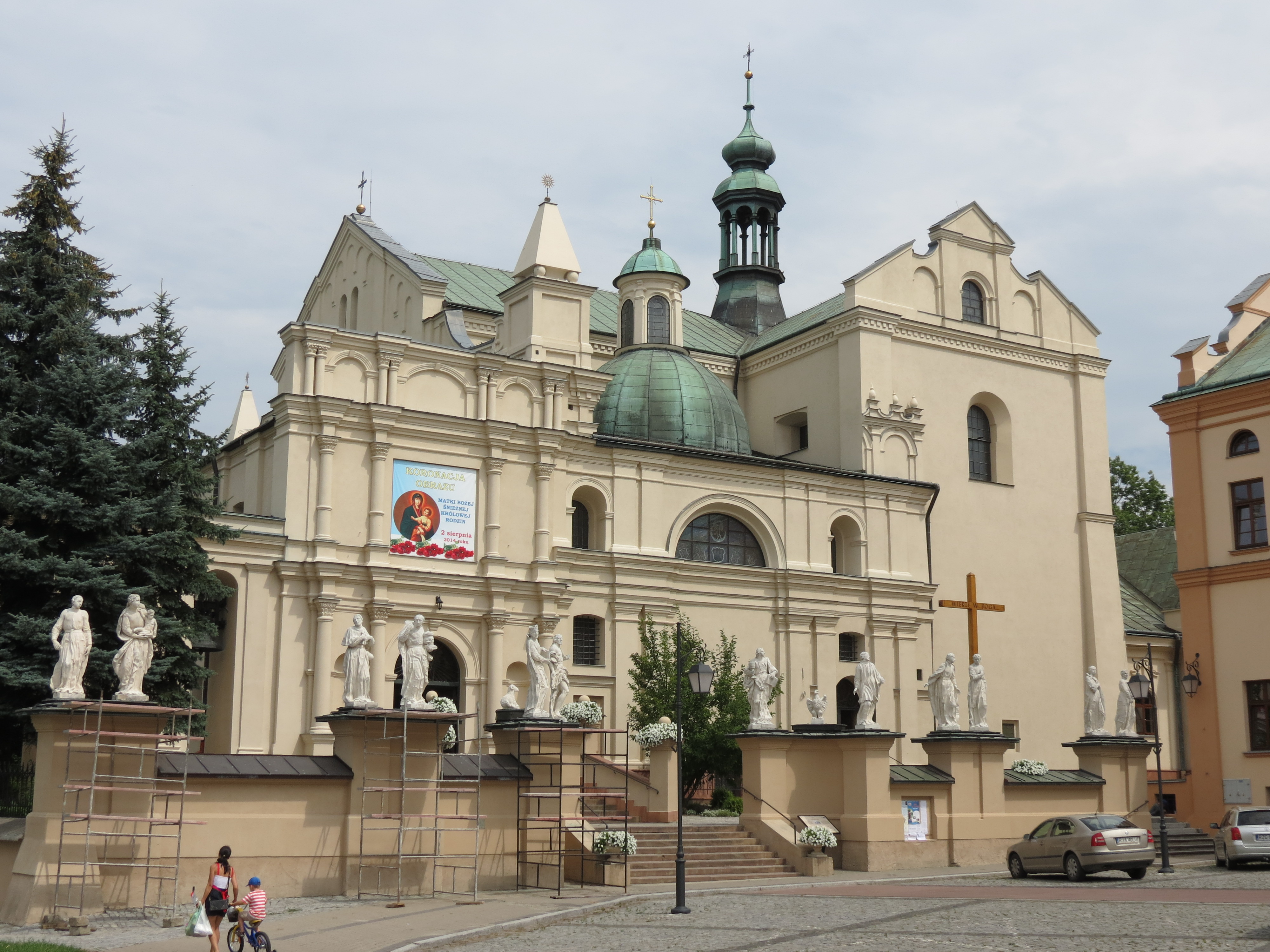 Jarosław, kościół p.w. św. Jana Chrzciciela, ob. par. p.w. Bożego Ciała, 1572, XVIII, 1890